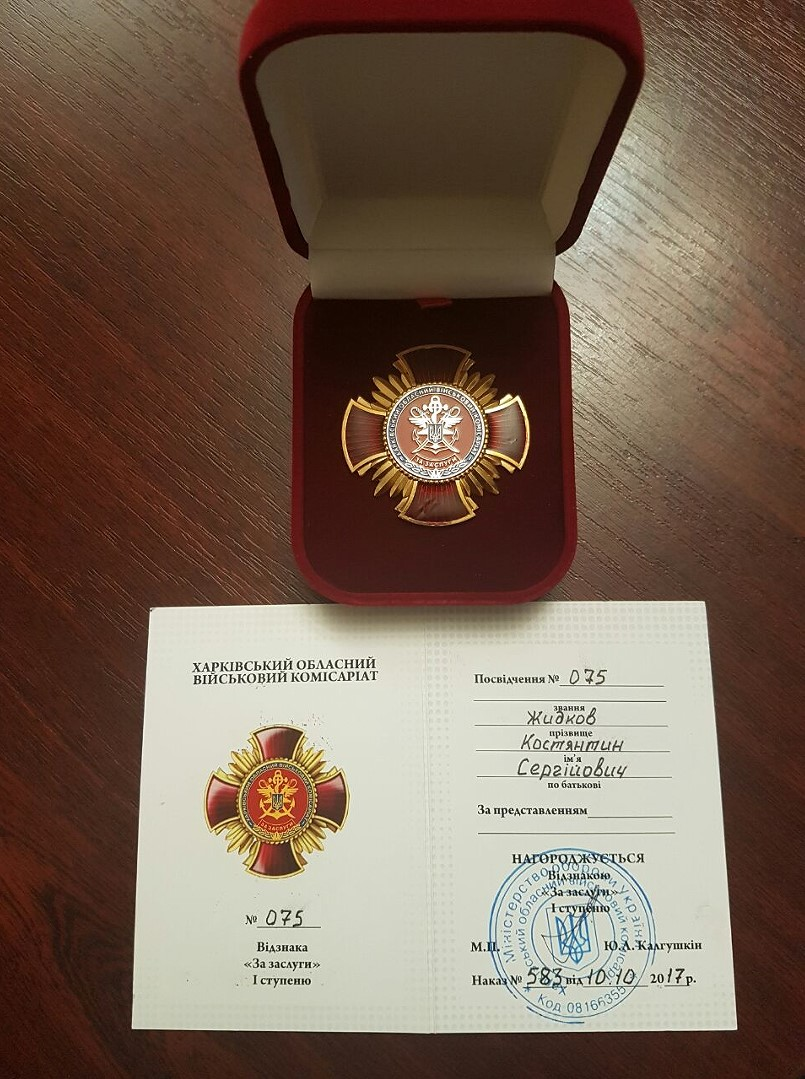 Відзнака за заслуги І ступеню, Жидков.К